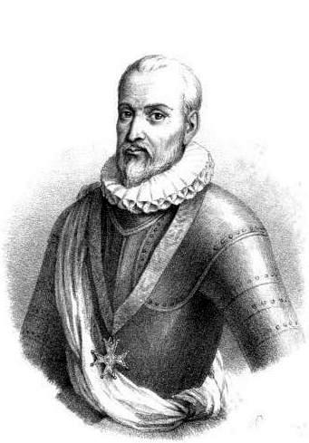 "Alphonse Ornano (Père), Maréchal de France".